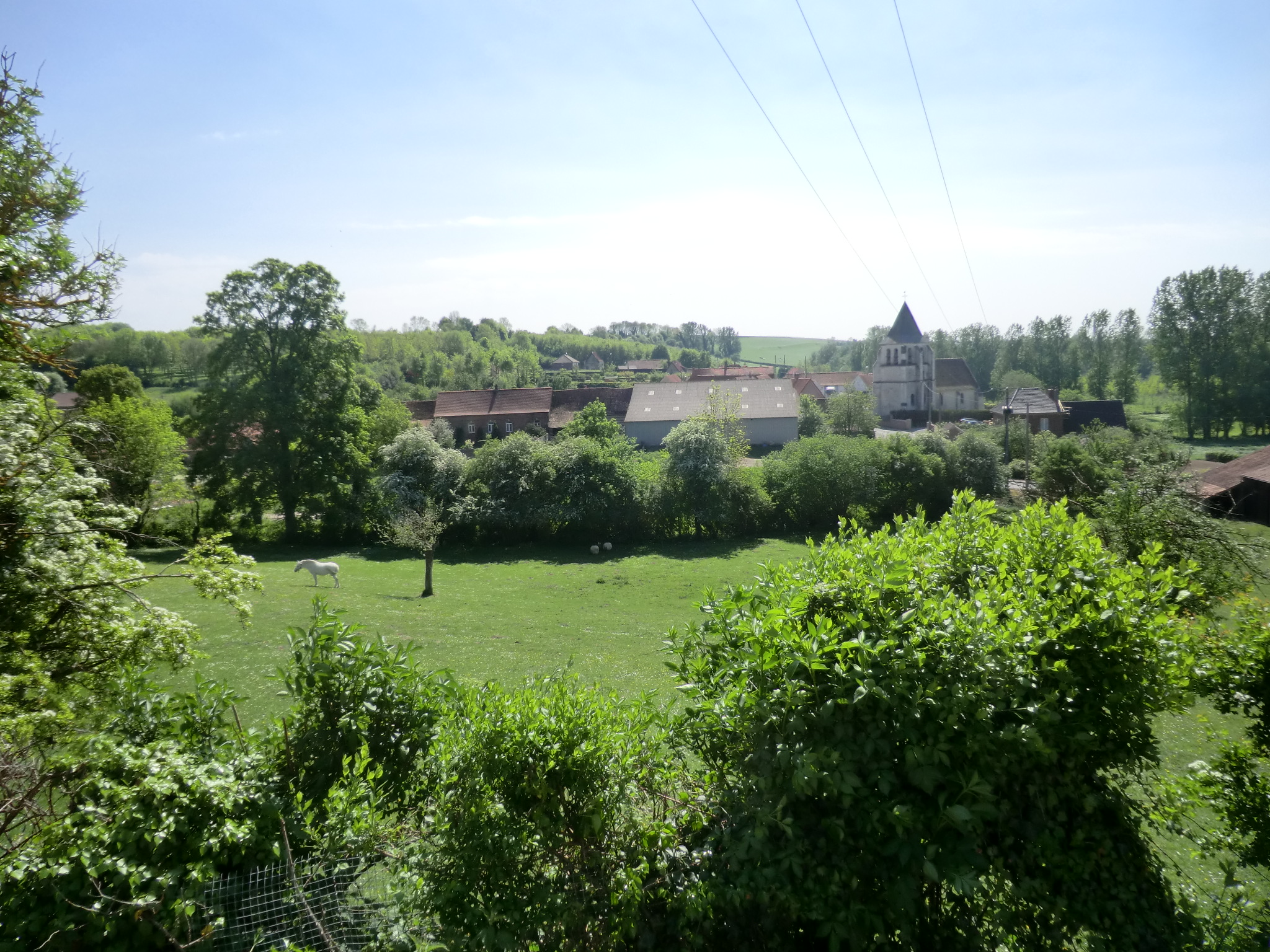 Vue sur le village de Remilly-Wirquin, Nord-Pas-de-Calais, France. Vue sur l'église, le bâti environnant, une parcelle de pâture (cheval) et la végétation locale.